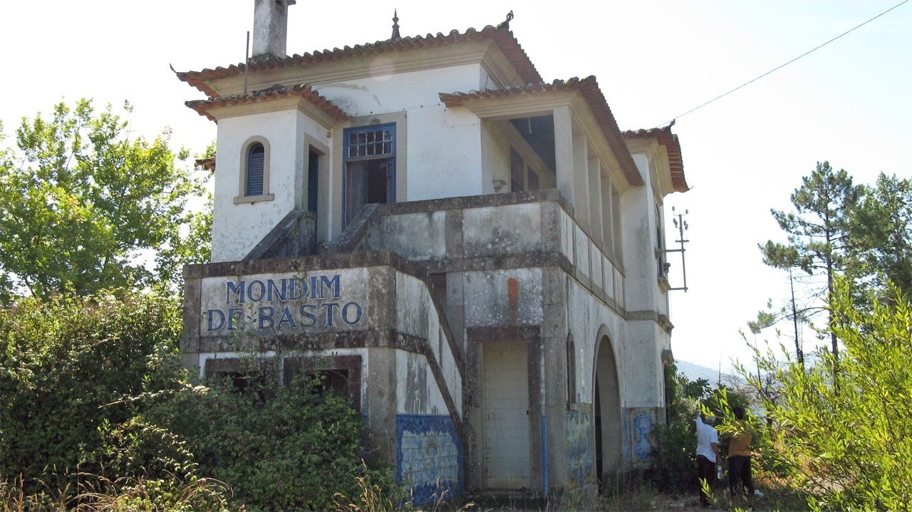 Peço desculpa pela contra-luz. Projectada por Cassiano Branco, esta estação é uma versão "espelhada" da estação de Duas Igrejas, na linha do Sabor. Contudo nesta podemos disfrutar de uma bela paisagem sobre o Tâmega, o alto da Sra da Graça e a vila de Mondim que, ironicamente fica a 2 km dali: a estação é em Veade, no concelho de Celorico, que fica também num distrito diferente: Braga (Mondim é Vila Real - o rio tâmega faz o limite de distritos) Conta-se que esta estação possuiu um jardim incrível e que foi vencedora de vários prémios. Do jardim nada resta, e as placas dos prémios, se as teve também desapareceram (assim como qualquer mobília que houvesse na estação) Pessoas na foto: O meu avô e uma pessoa que também veio ver esta bonita (mas degrada) estação